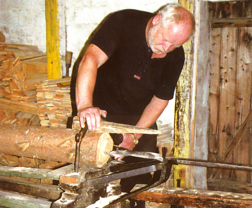 Röhrenbohrmeister